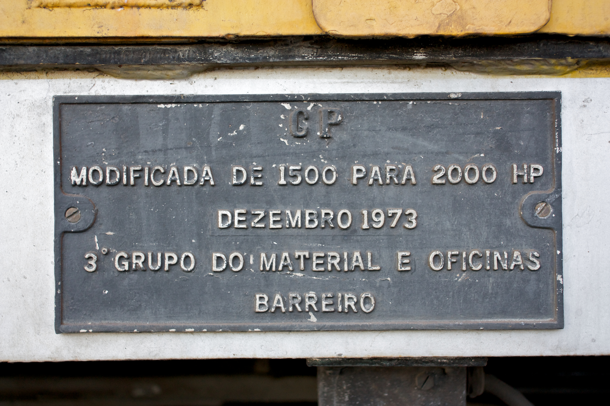 pormenor de placa de modificação. Local: Estação de Alcácer do Sal [Linha do Sul, PK 78] Data e hora: 11 de Outubro de 2010 [18h59] Material: Locomotiva 1525 [Alco] N.º UIC: 90 94 200 0020-2 P (Somafel 1417)